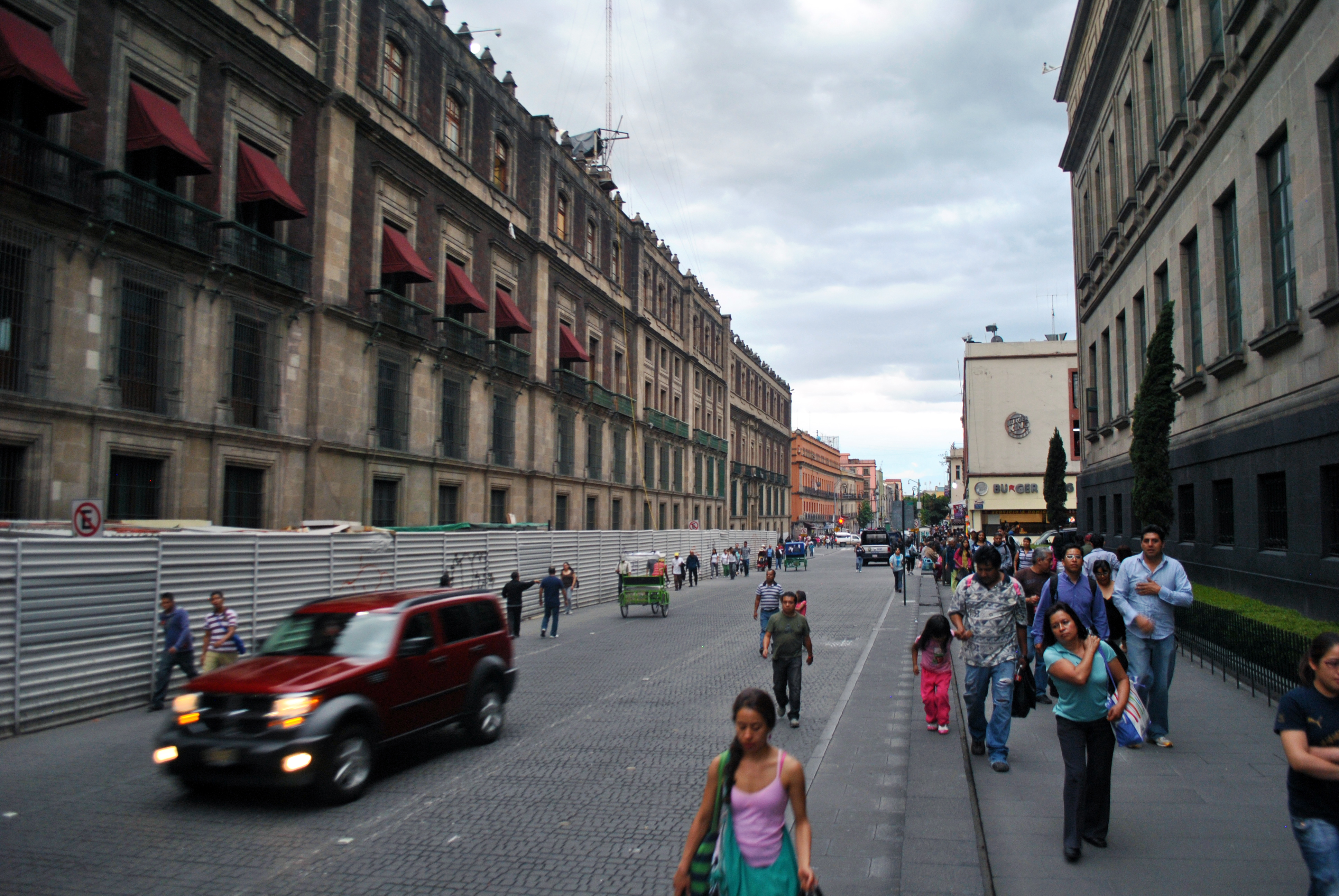 Calle Corregidora, Centro Histórico de la Ciudad de México, junto al palacio nacional